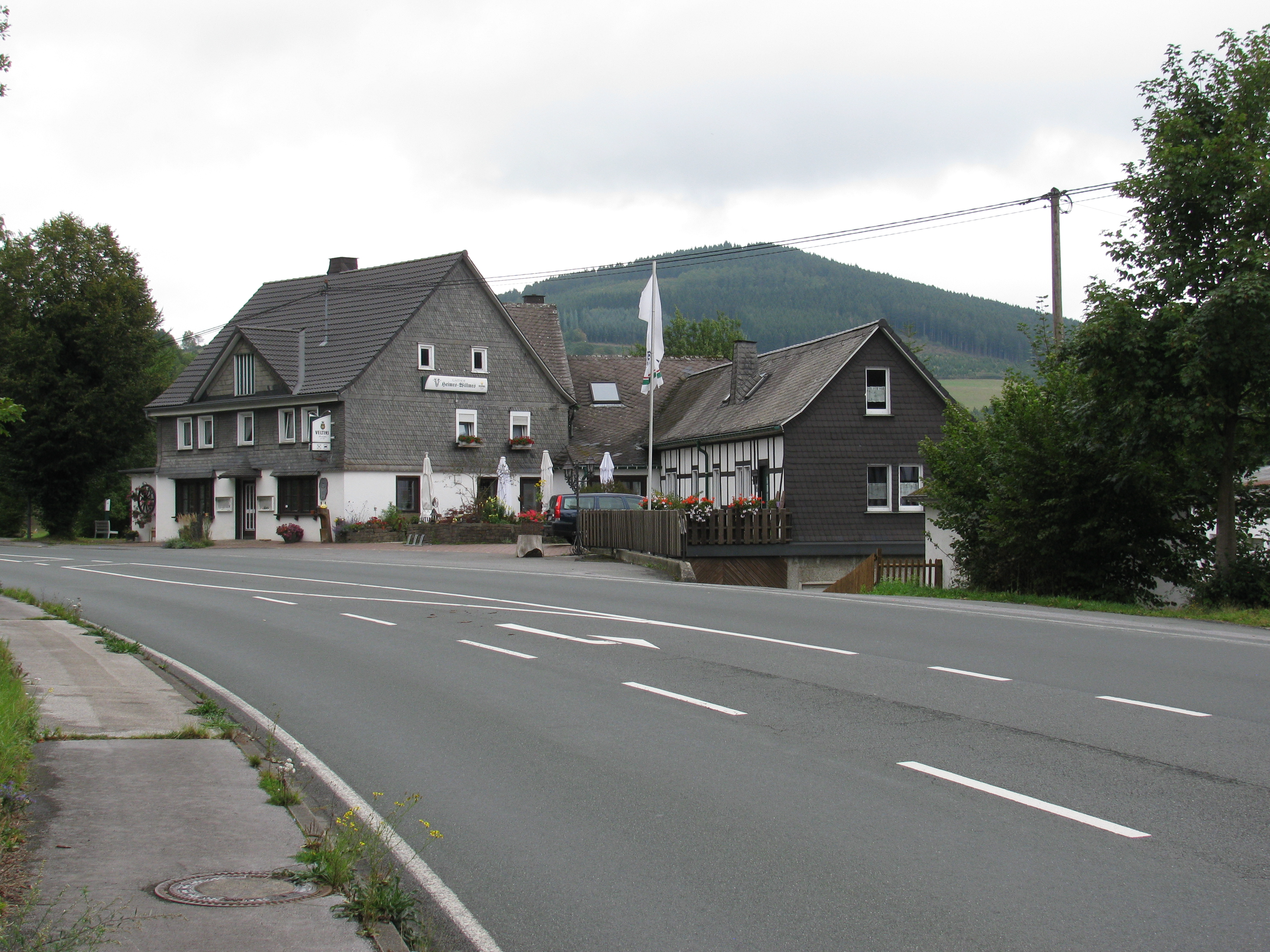 das Gasthaus Heimes-Willmes an der Lennestraße 6 (Bundesstraße 236) in Schmallenberg-Lenne